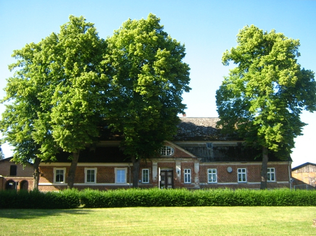 Teil des Schlossensambles Nehringen an der Trebel in Vorpommern (Gem. Grammendorf, Landkreis Nordvorpommern.